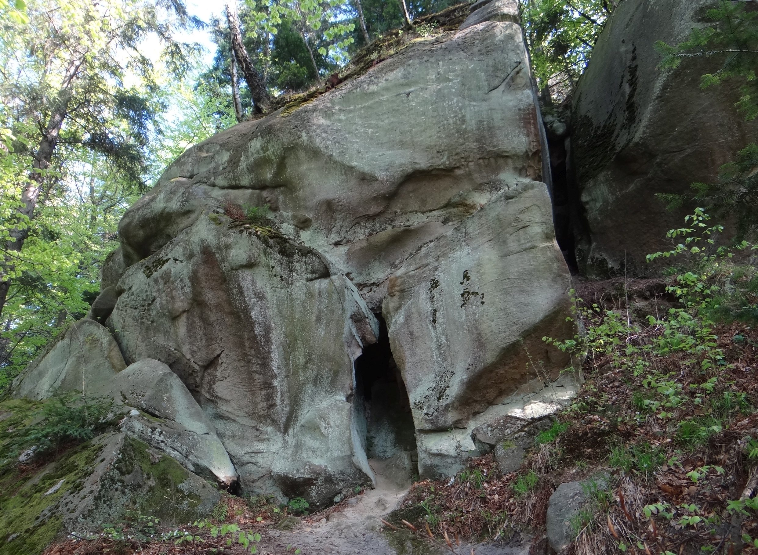 Dwie Skały w rezerwacie przyrody Diable Skały na Bukowcu